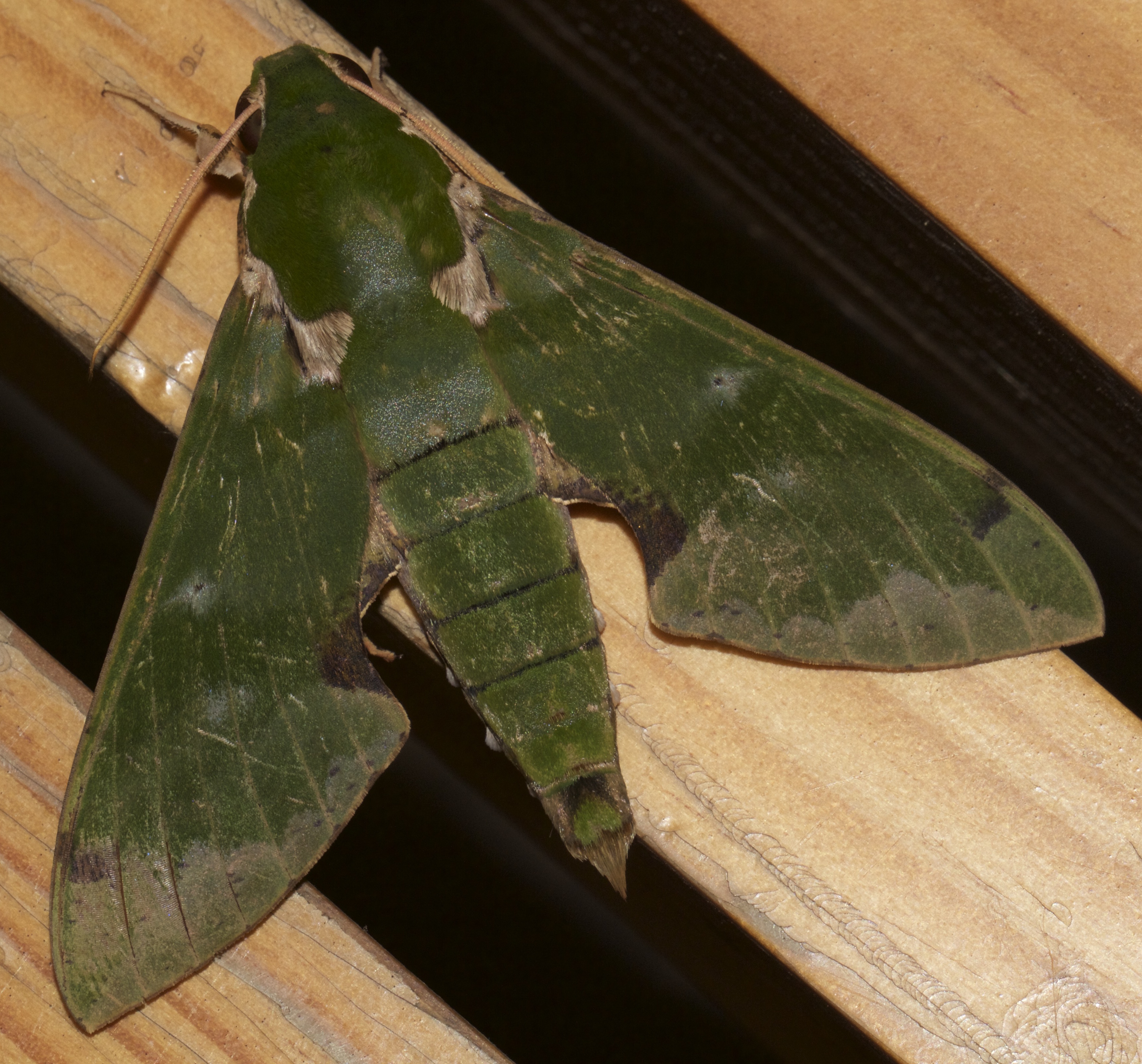 Euchloron megaera lacordairei (Madagascar, Ranomafana N.P., Centre ValBio, 2013)1